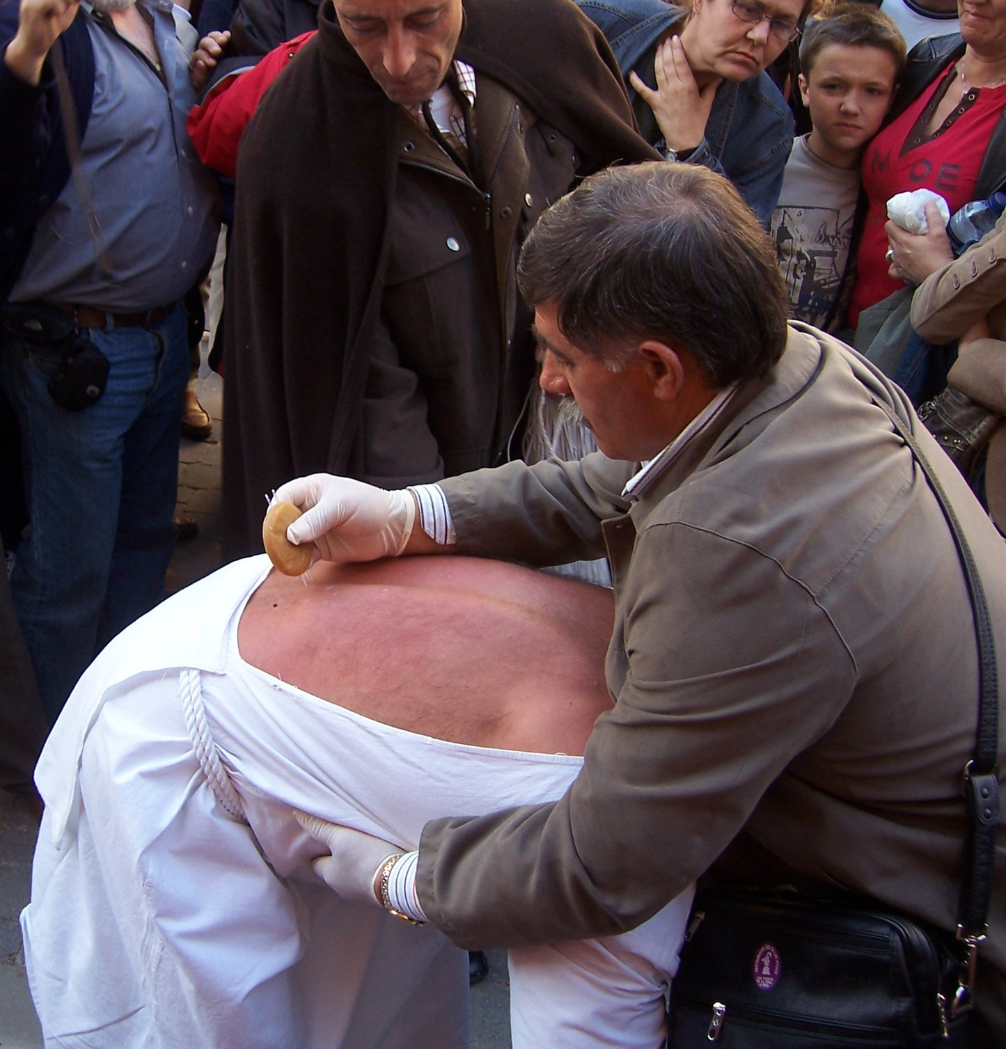 El práctico picando a un disciplinante. San Vicente de la Sonsierra. La Rioja (España)